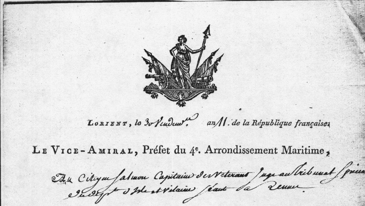 Entête de courrier du préfet du 4e arrondissement maritime (Lorient) en France en l'An XI. Hauteur du document : 24 cm. Hauteur vignette : 5 cm. Vignette remarquable par l'attitude aguicheuse du personnage...